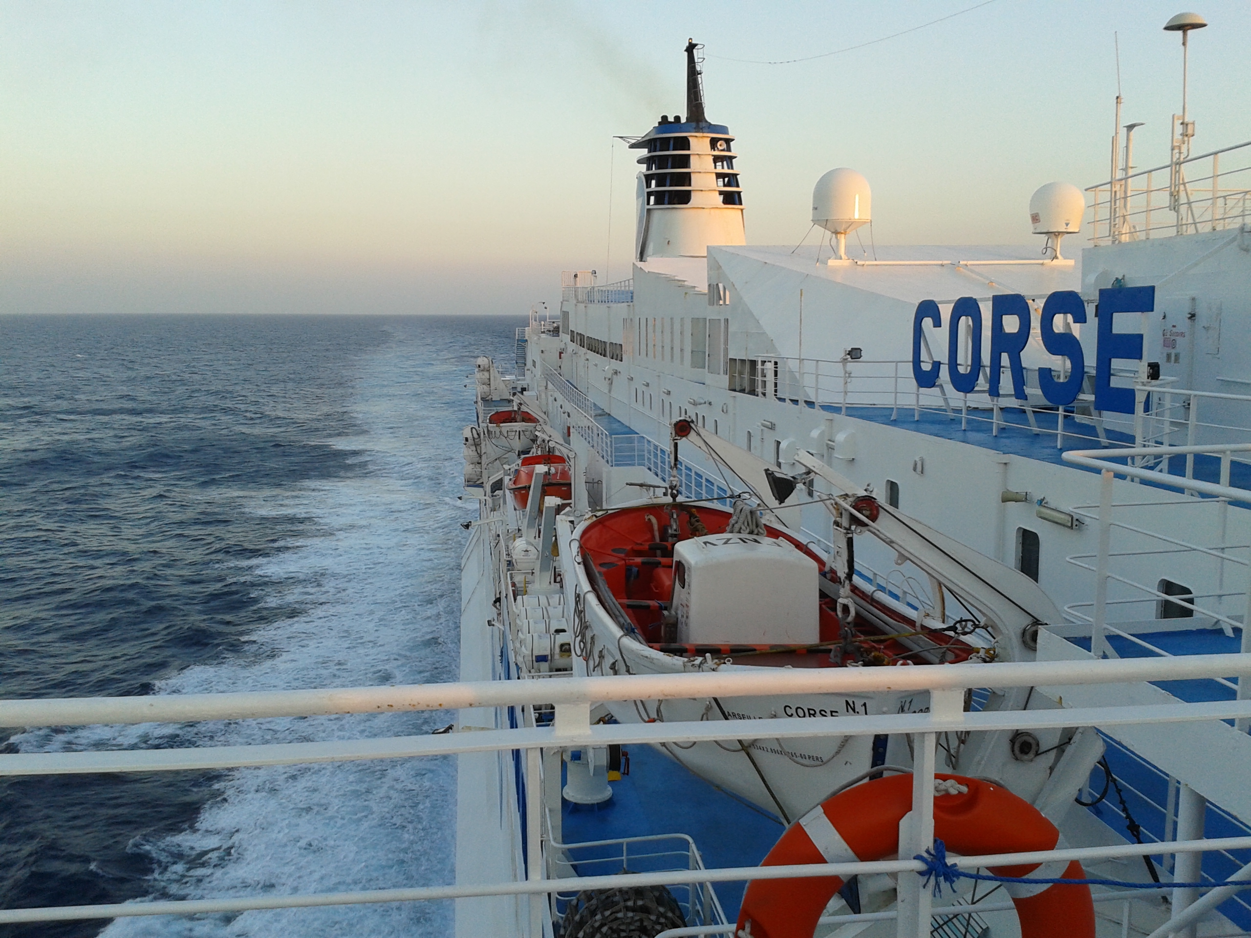 Vue (tribord, avant) à bord du Corse, lors d'une traversée en 2014, entre Ajaccio et Marseille.